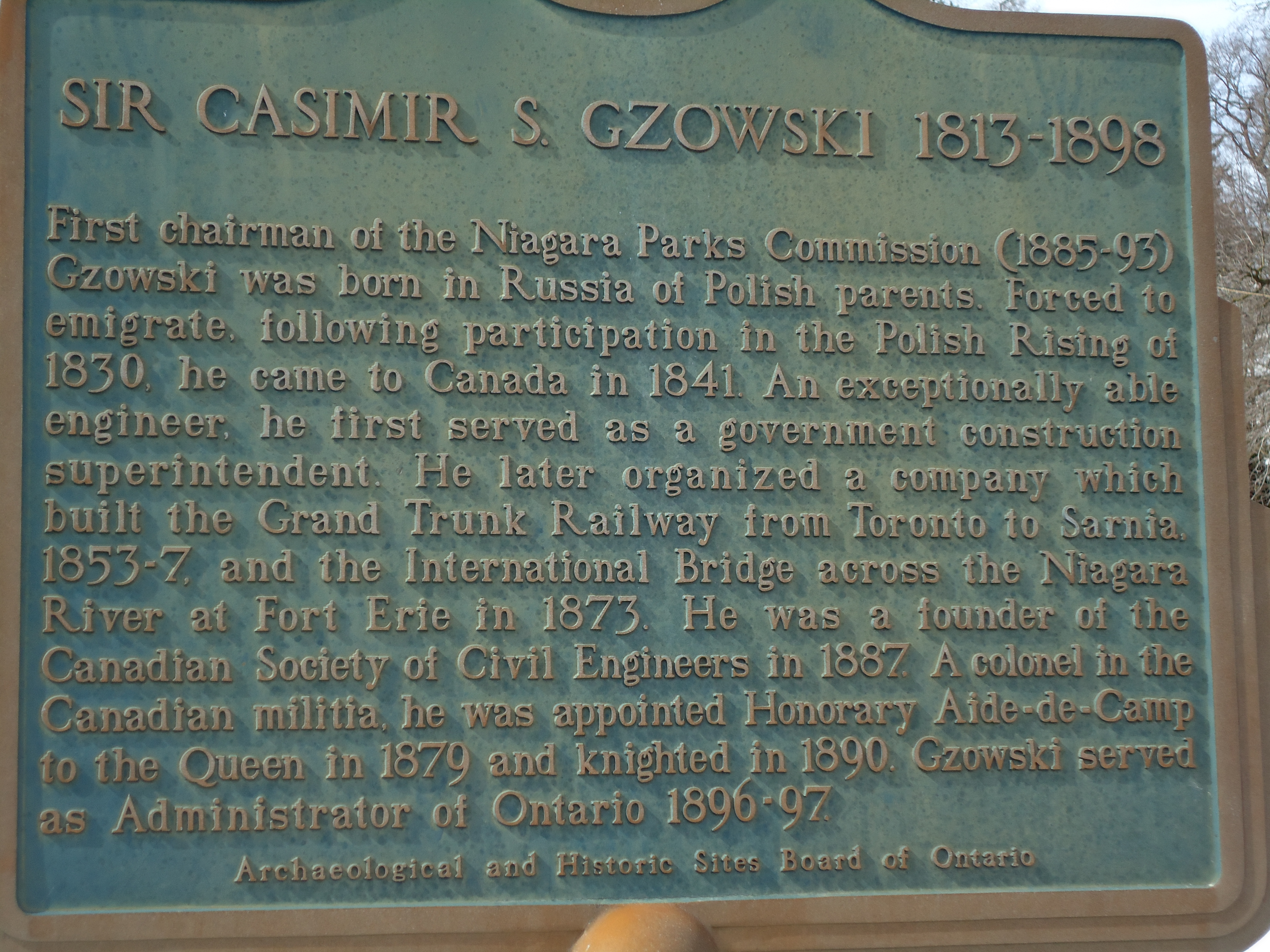 Kazimierz Gzowski - tabliczka pamiatkowa